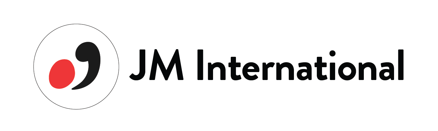 Logo JMI